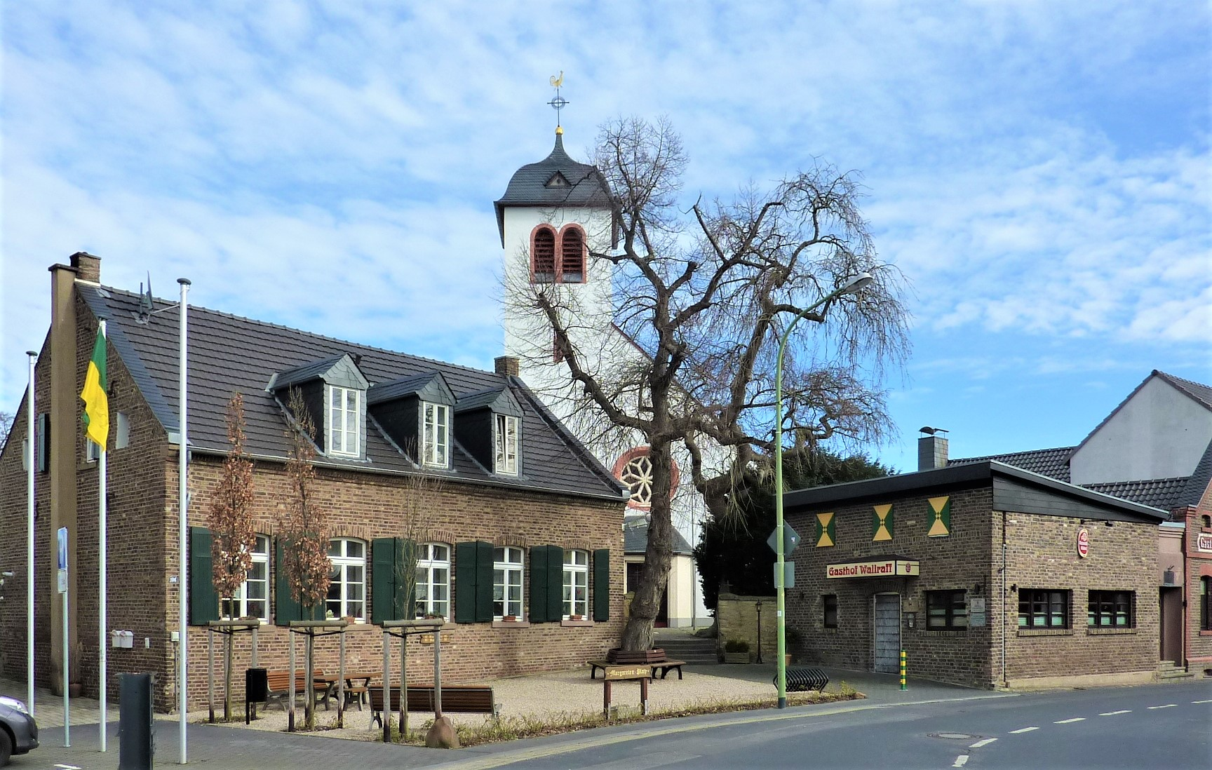 Hoven (Zülpich)